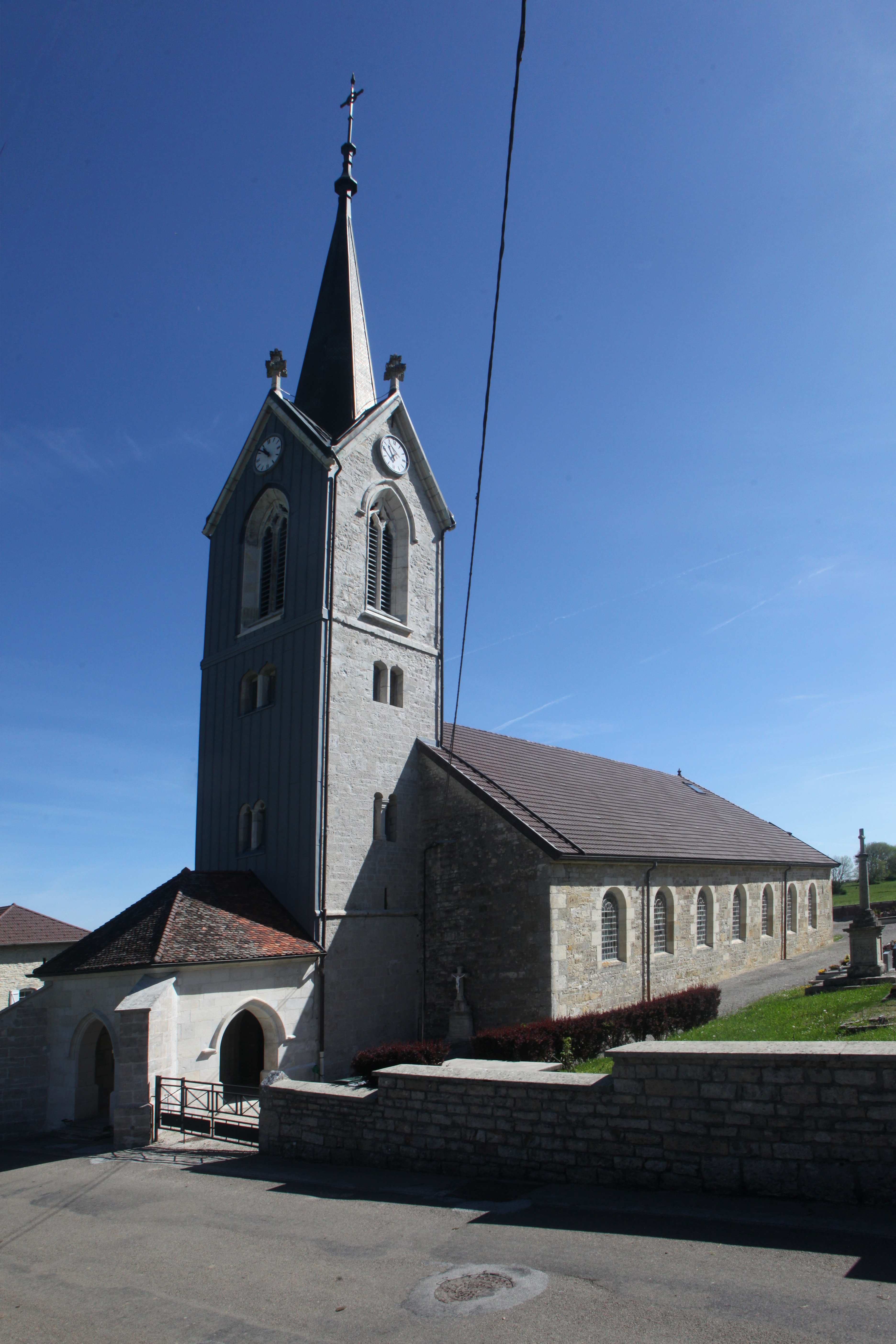 Église de Villeneuve-d'Amont (Doubs).